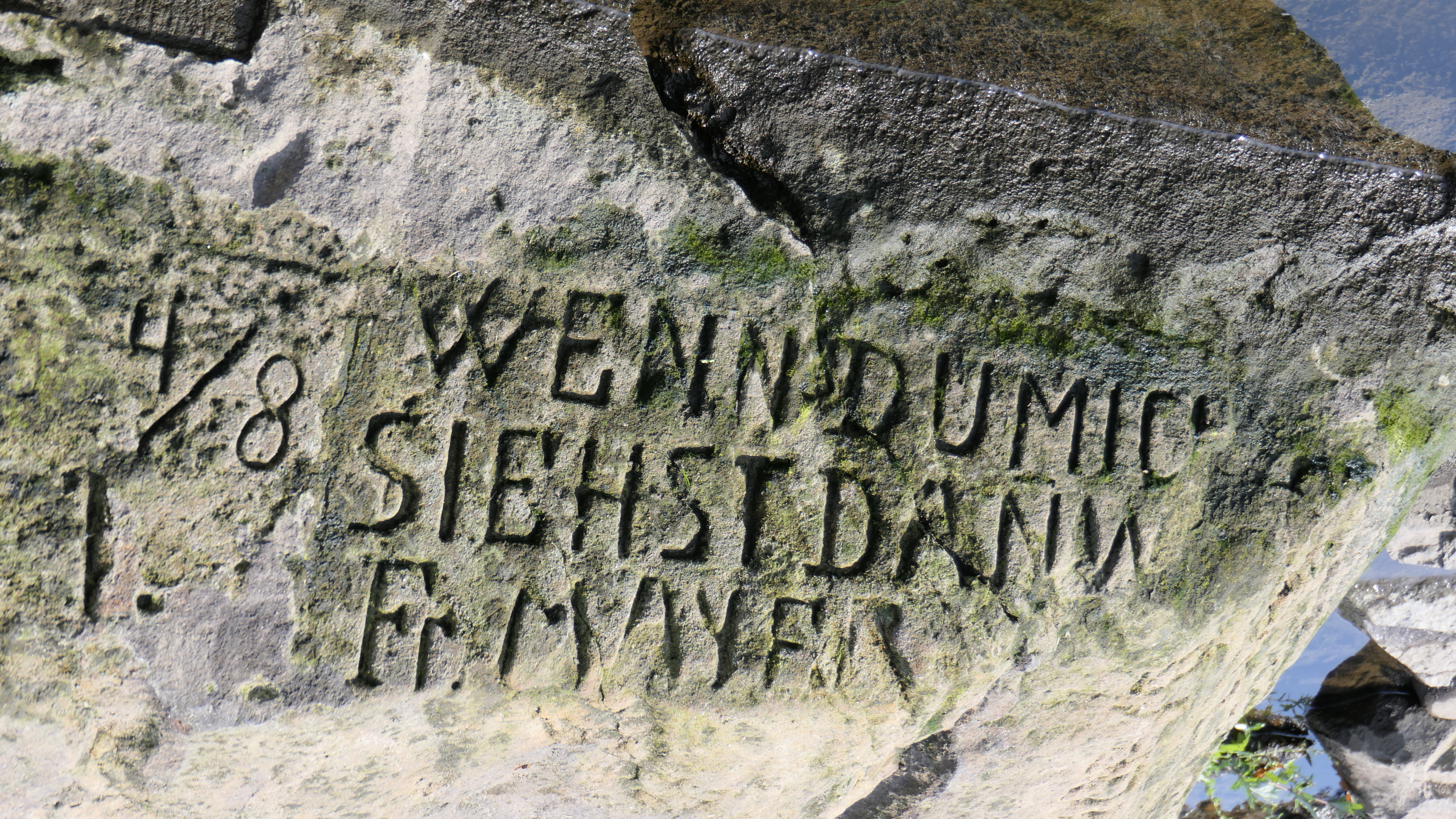 Hungerstein in Decin